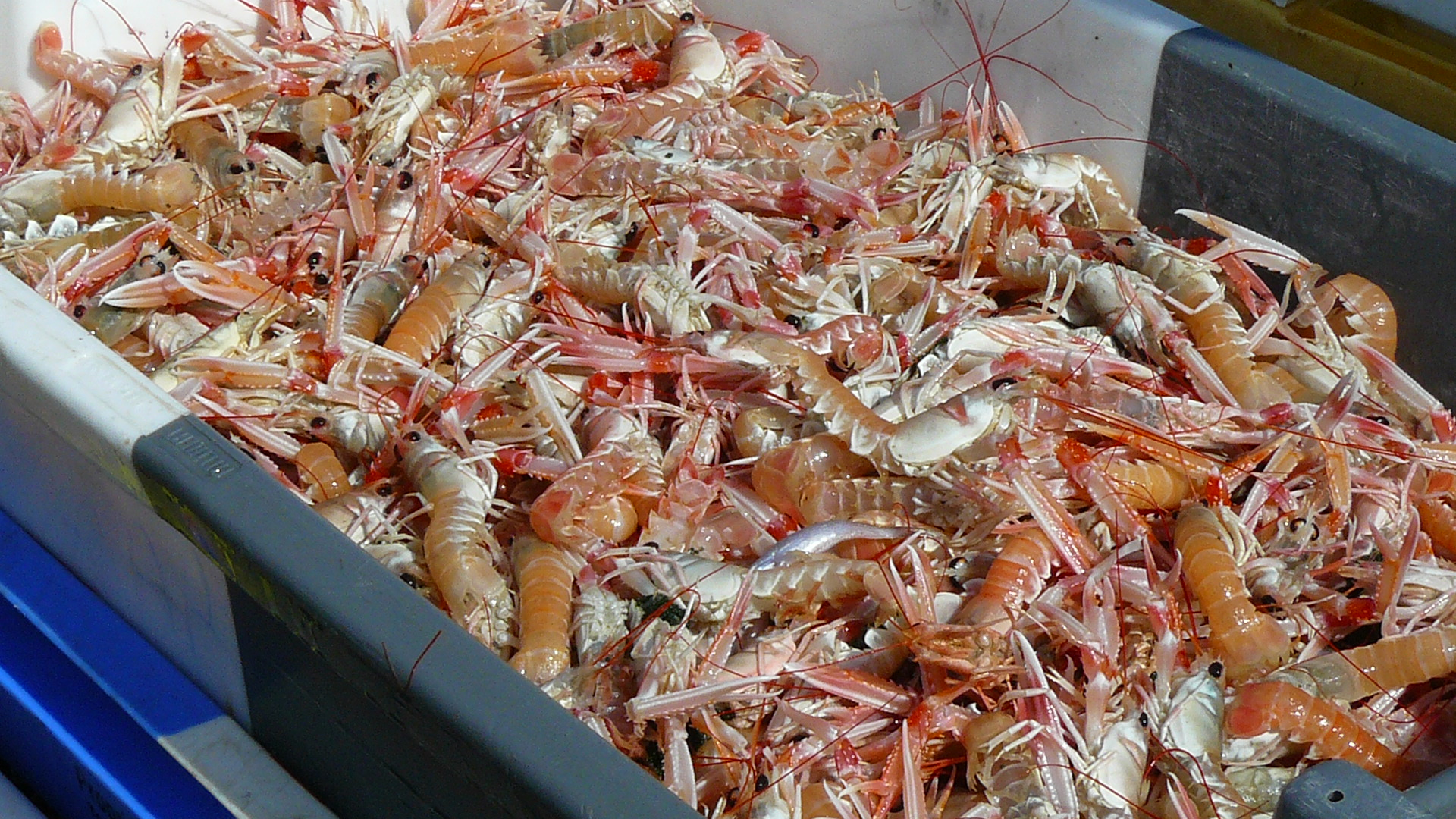 Langoustine vivante débarquée sur le quai de Lesconil, en août 2013, par un des deux derniers chalutiers du port.